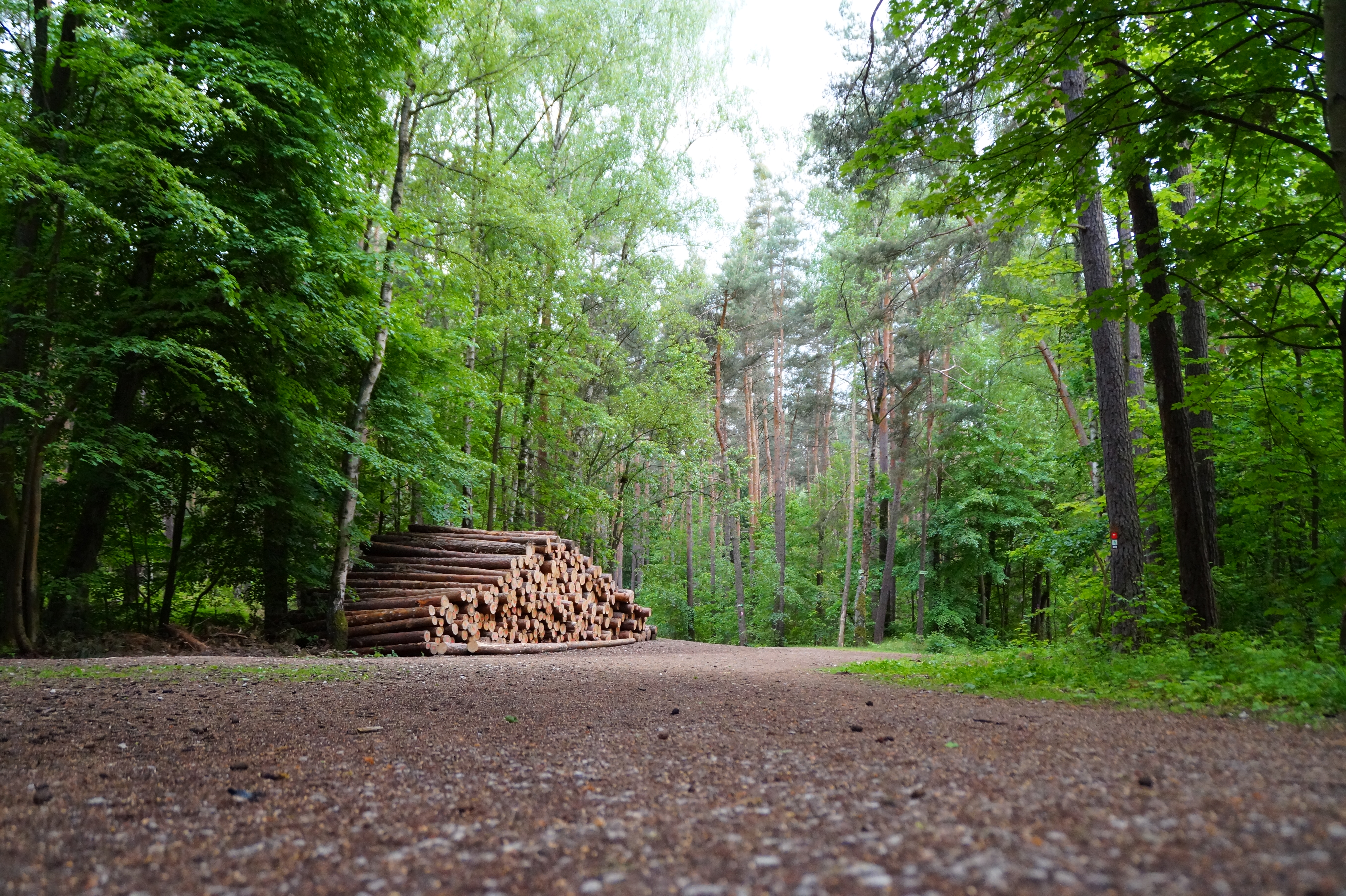 Das Bild wurde in Fürther Stadtwald aufgenommen.